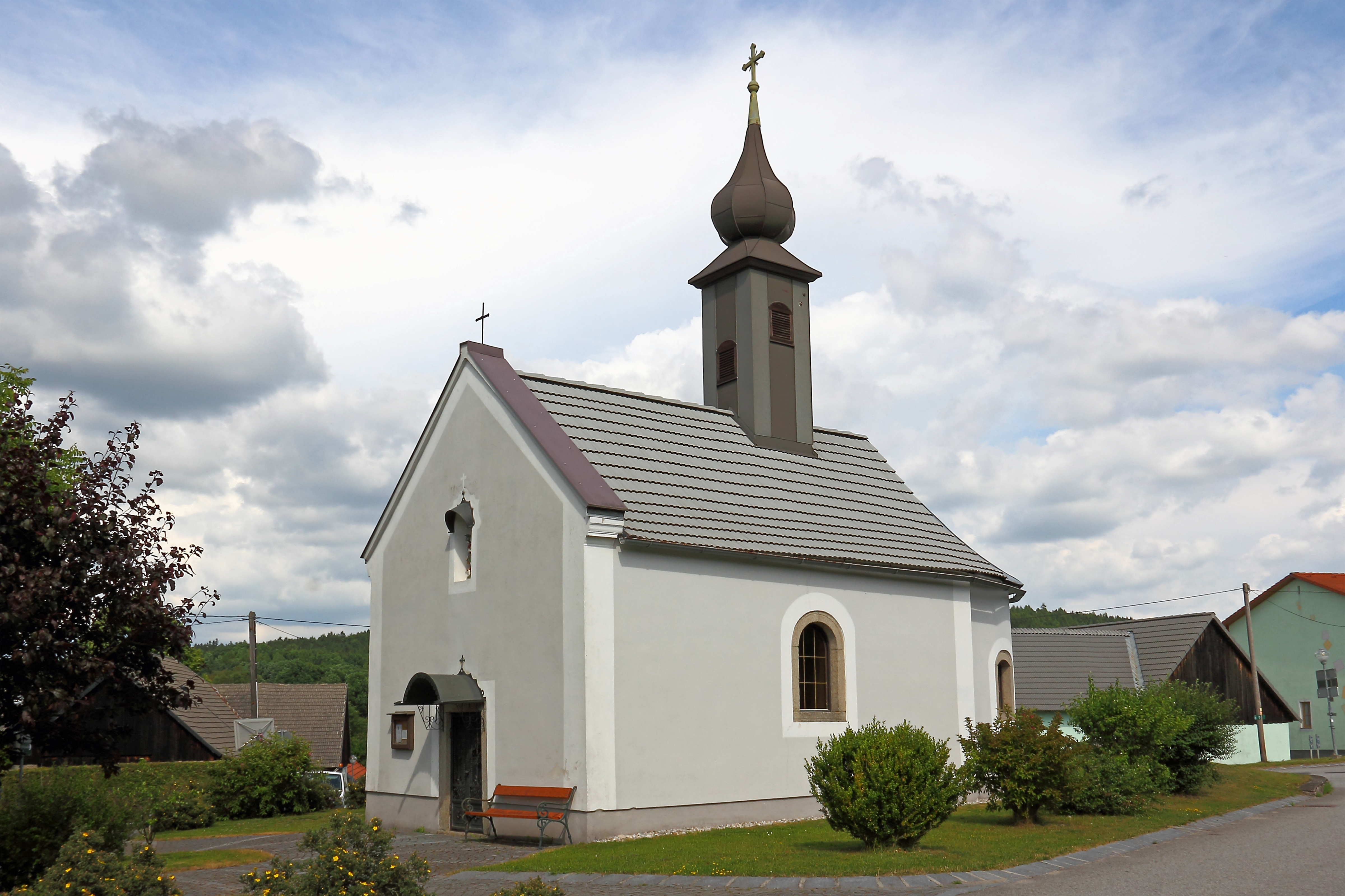 Die im Jahr 1786 errichtete Ortskapelle zum gekreuzigten Heiland wurde 1786 errichtet.